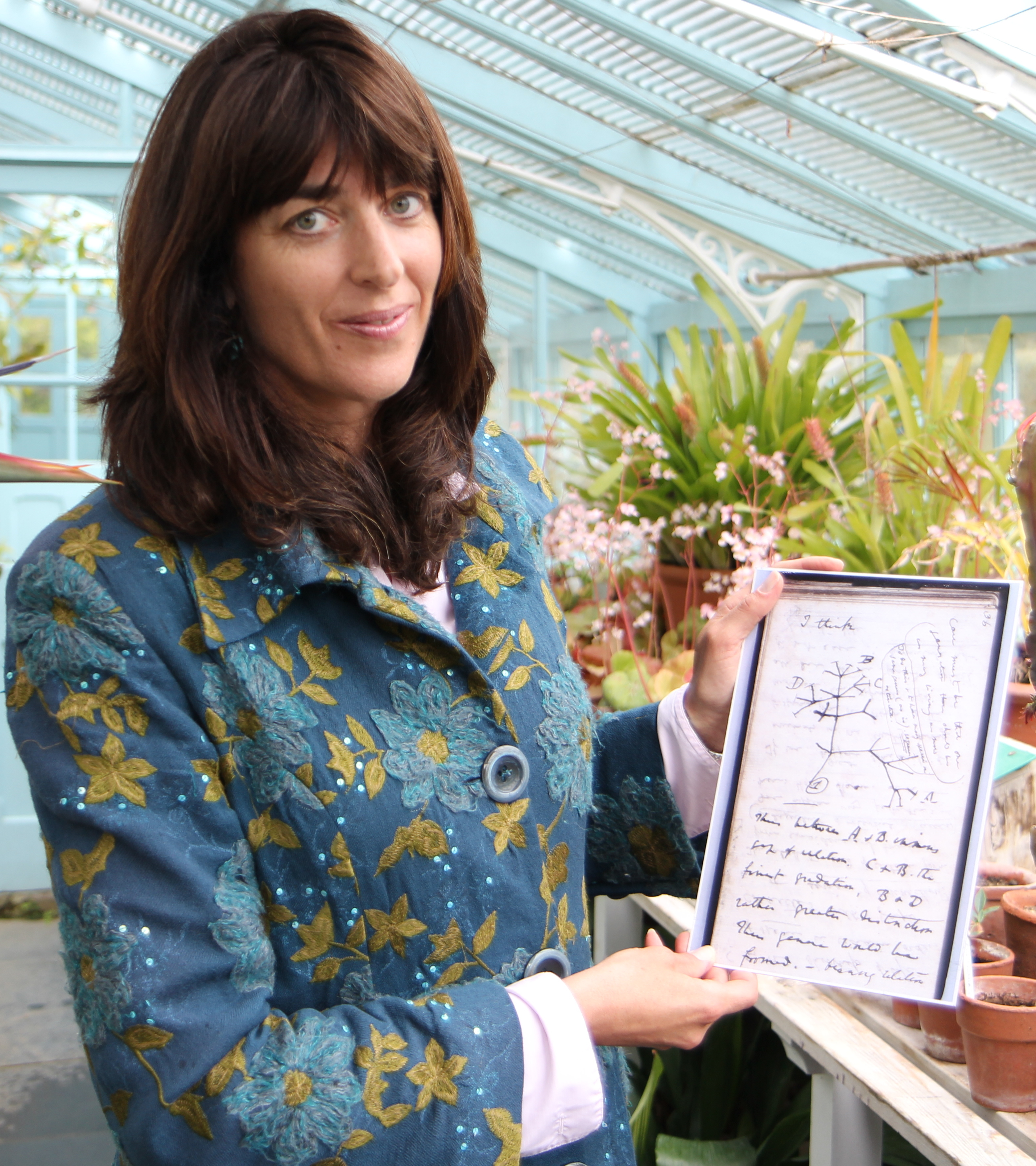 Biologen Sarah Darwin berättar om den banrytande skiss där Charles Darwin sammanfattar sina tankar om evolution. FOTO Magnus Sjöström - Bilderna som förändrade vetenskapen Shocking exposures 5